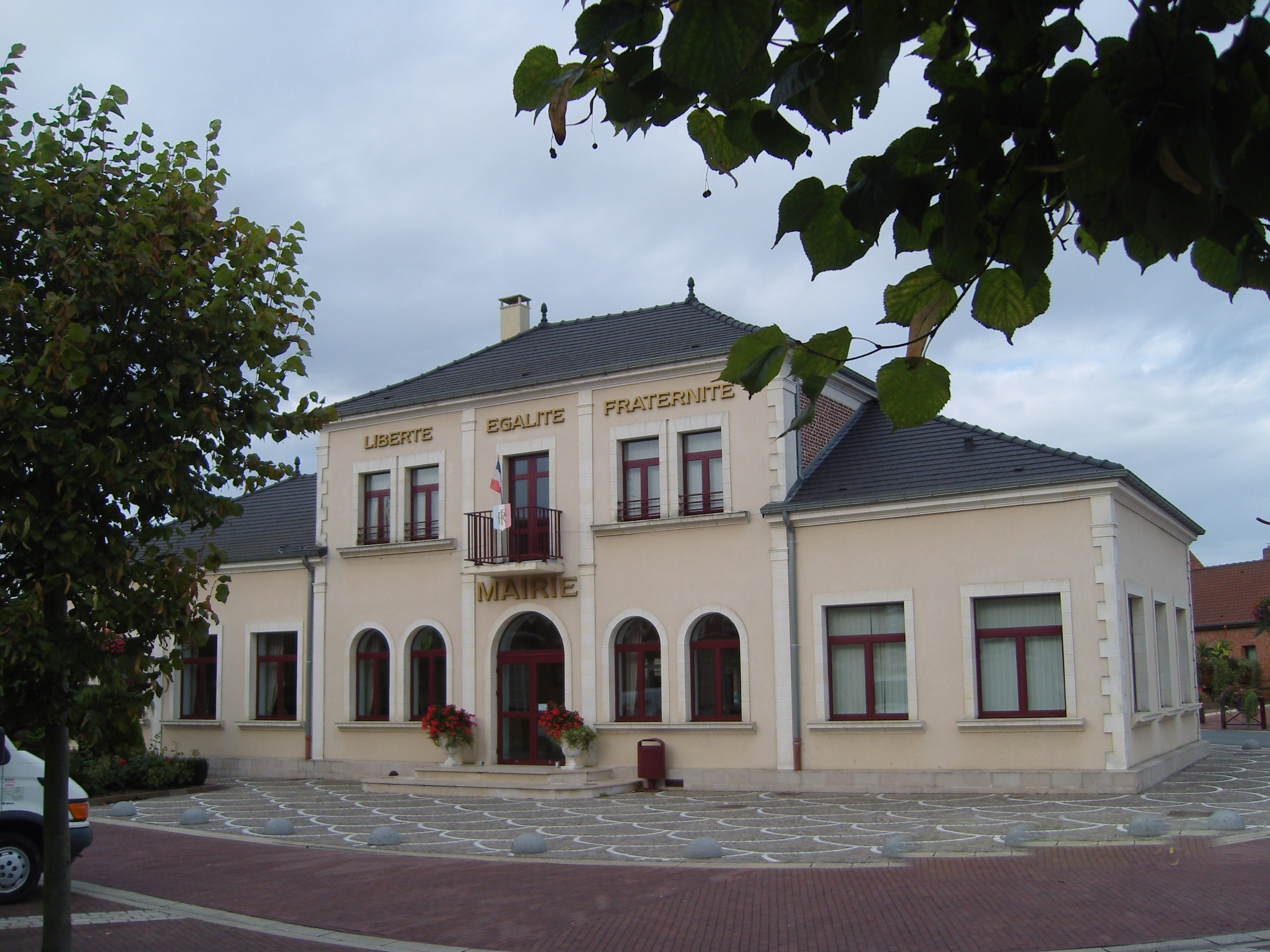 Mairie d'Hordain